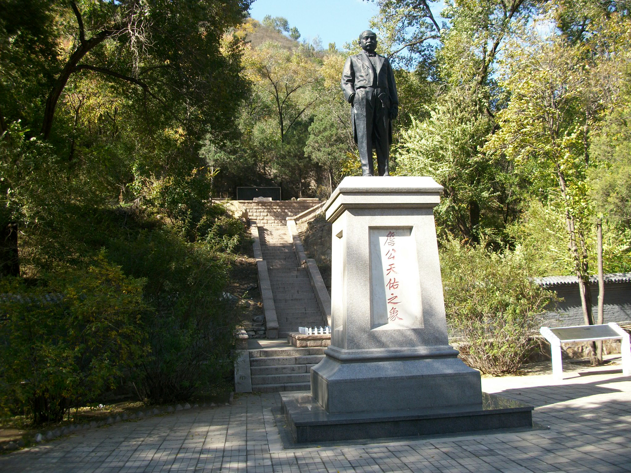 Zhan Tianyou statue at Qinglongqiao Station.